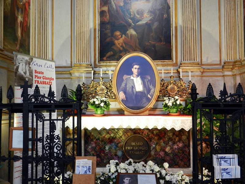 Torino - Tomba del B. Pier Giorgio Frassati all'interno del Duomo